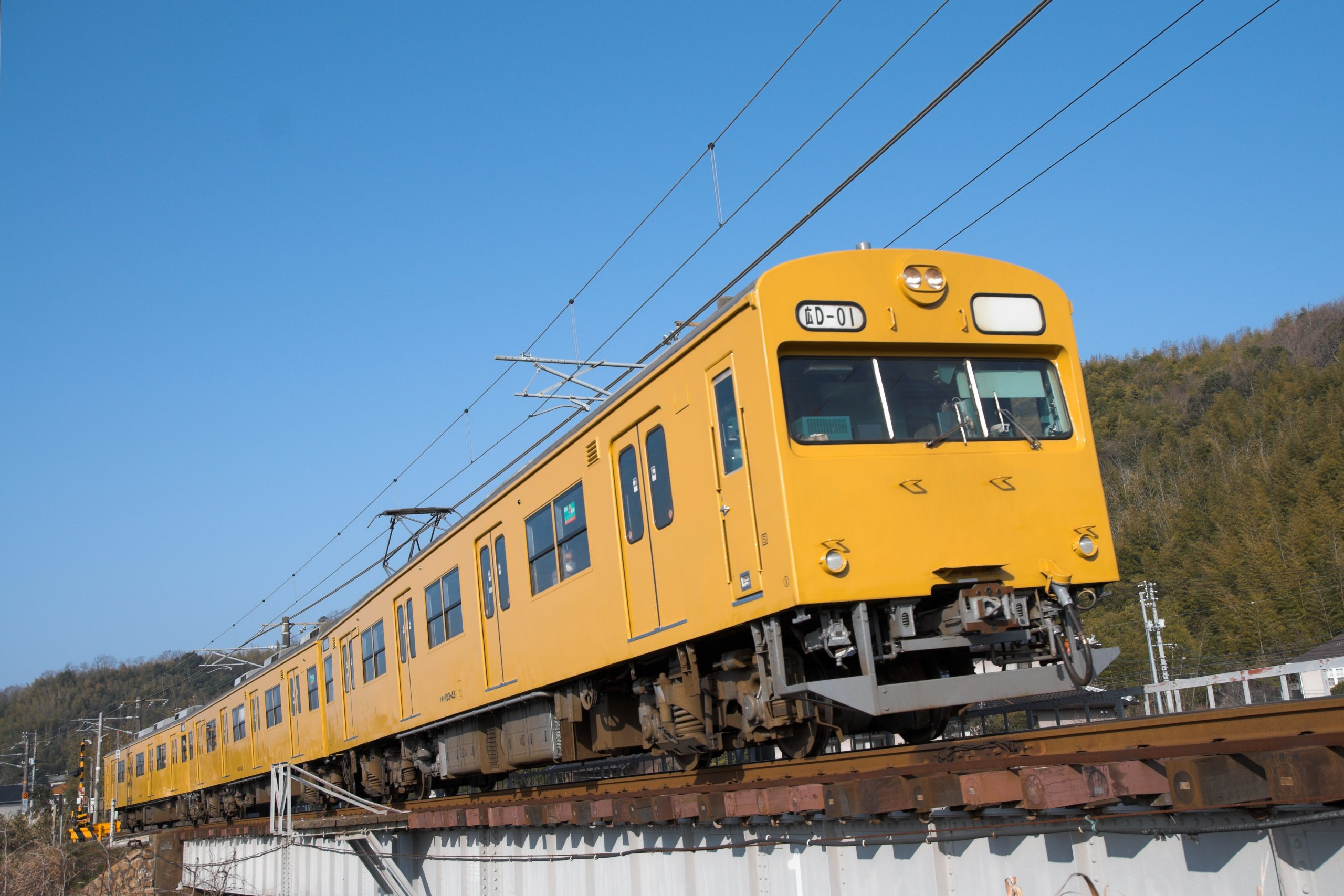 呉線・竹原付近 PENTAX K-5 TAMRON-SP 17-50/2.8DiⅡ LD